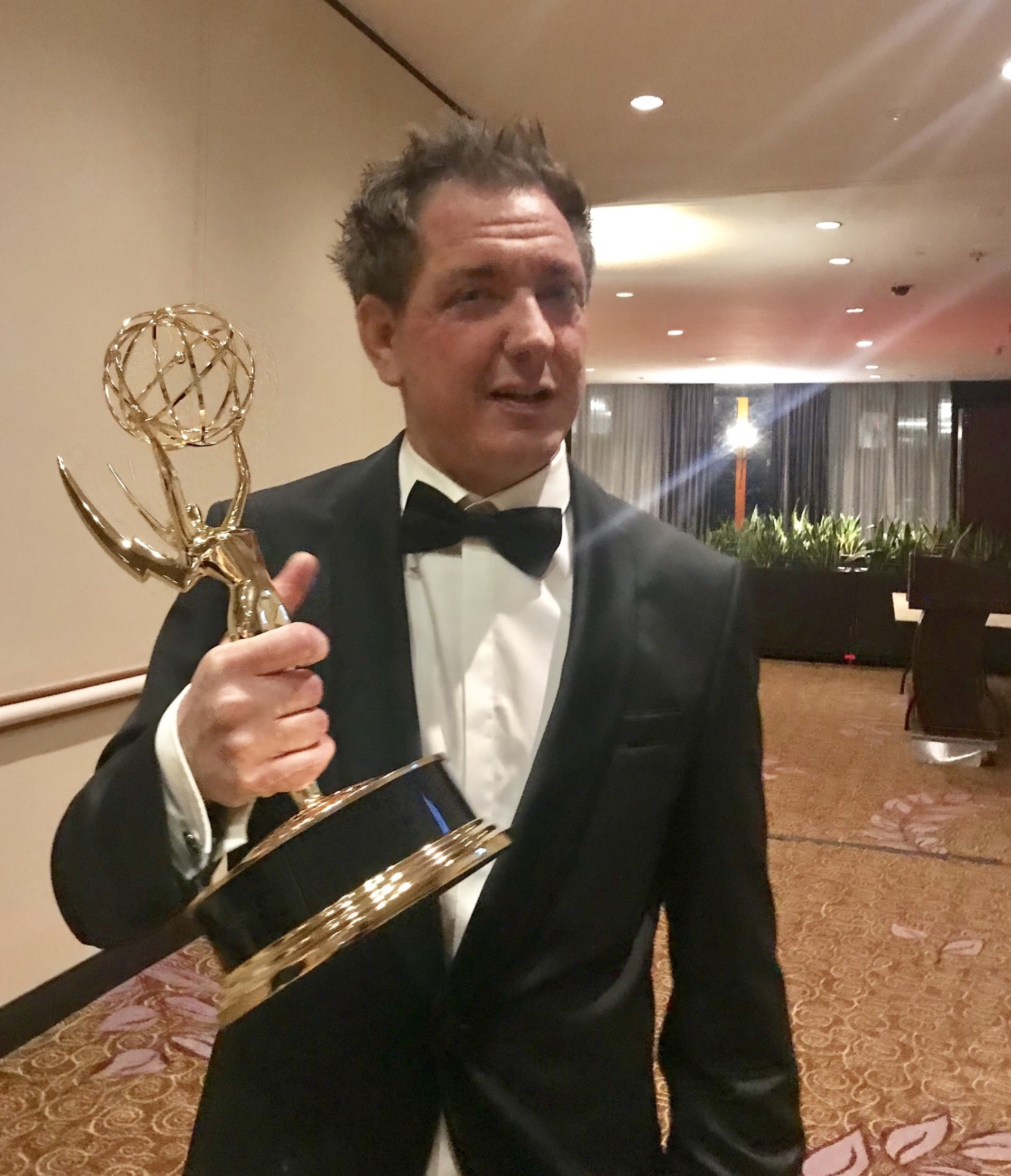 Manuel Meimberg bei den International Emmy Awards 2017 Depicted person: Q62122424